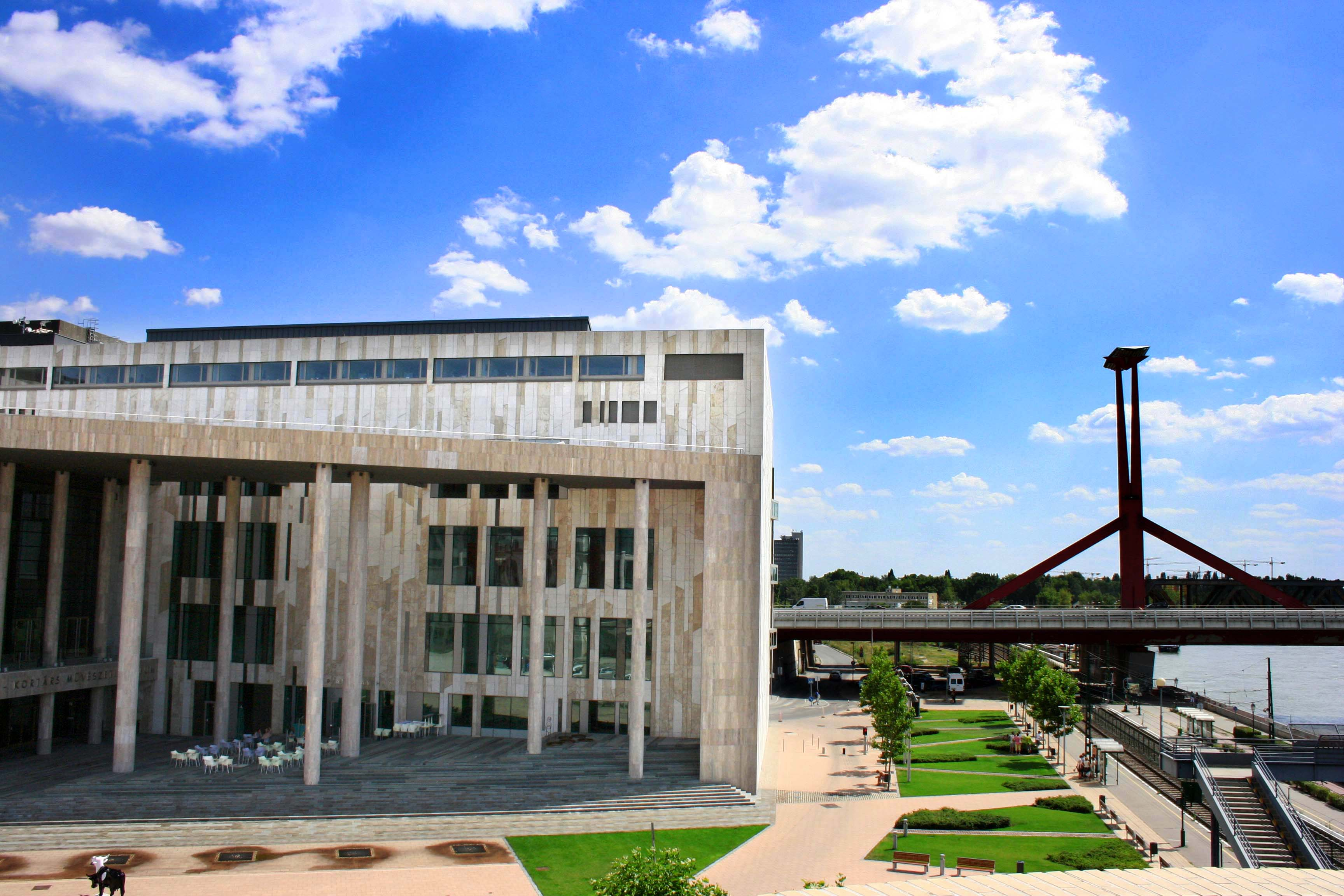 Palace of Arts, Budapest